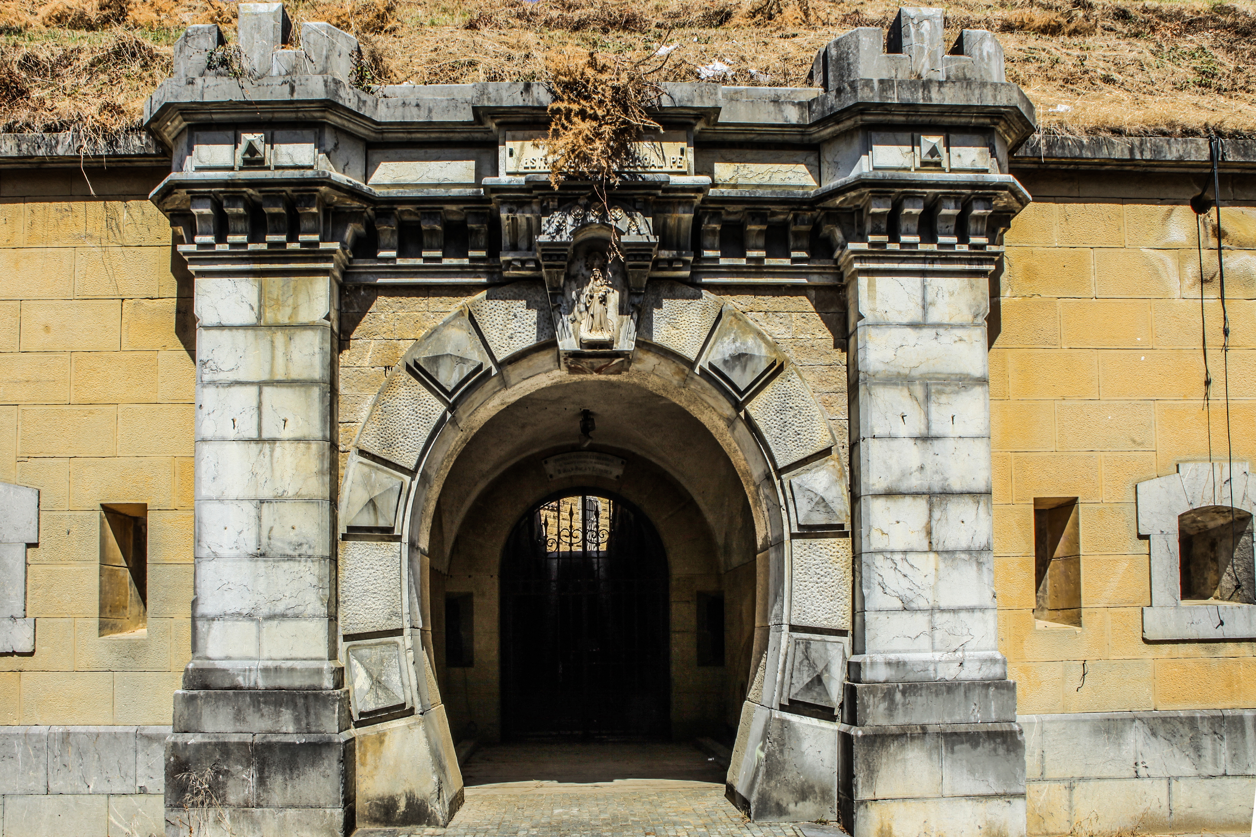 Puerta principal del fuerte de Nuestra Señora de Guadalupe (Hondarribia, Gipuzkoa, País Vasco). Se situa en la escarpa del foso que rodea la fortificación. En la clave posee una imagen de la virgen de Guadalupe, patrona de la localidad de Hondarribia (también conocida como Fuenterrabía).